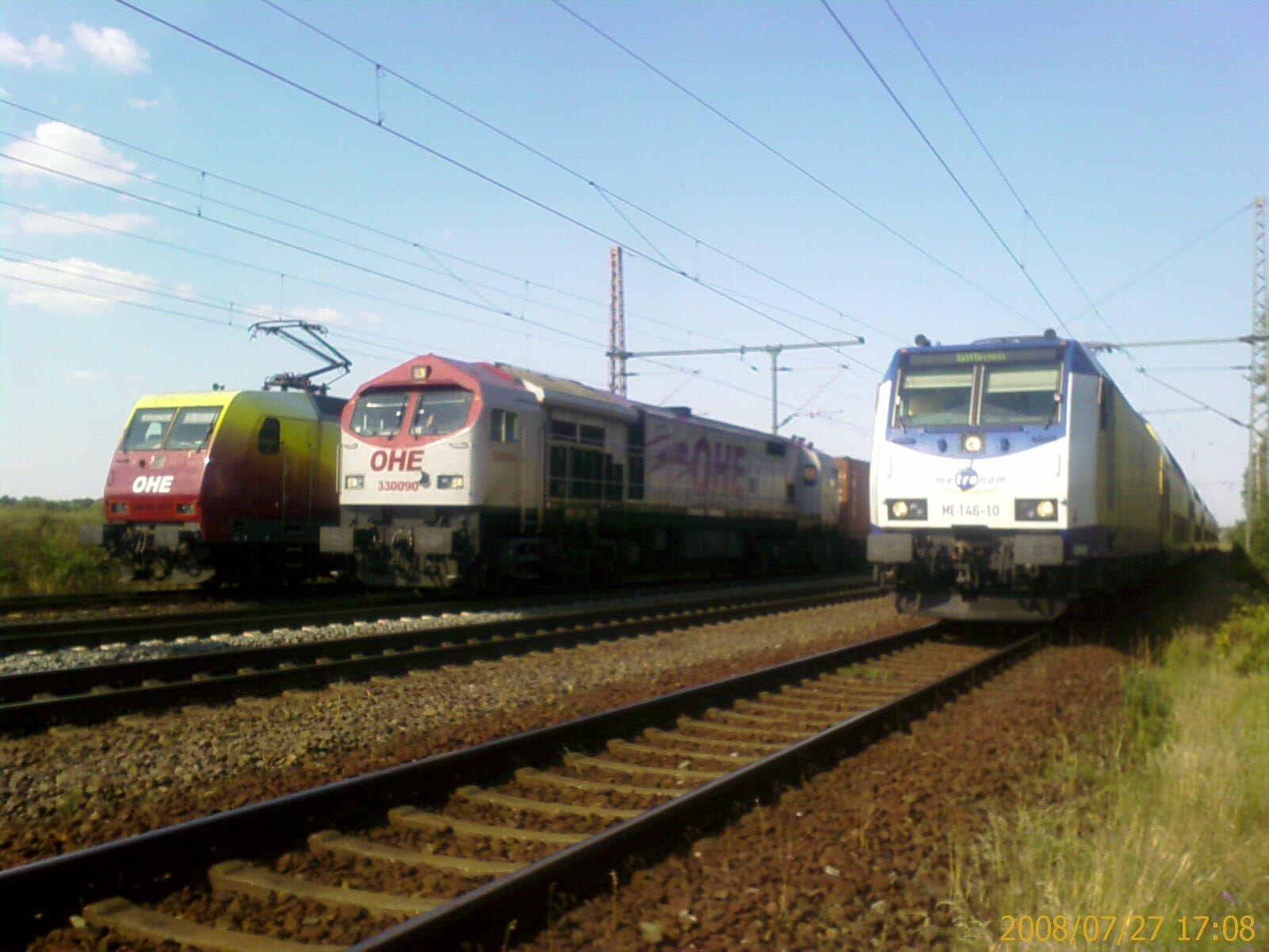 „OHE vs. Metronom in Eschede“ Am 27.07.2008 kam es hier um ca. 17 Uhr wgen eines Oberleitungsschadens zu einem kleinen Familientreffen. Da an seinen liesten Weggefährten immer mitnimmt, hat die 145 der OHE Ihrem Tiger mitgebracht!